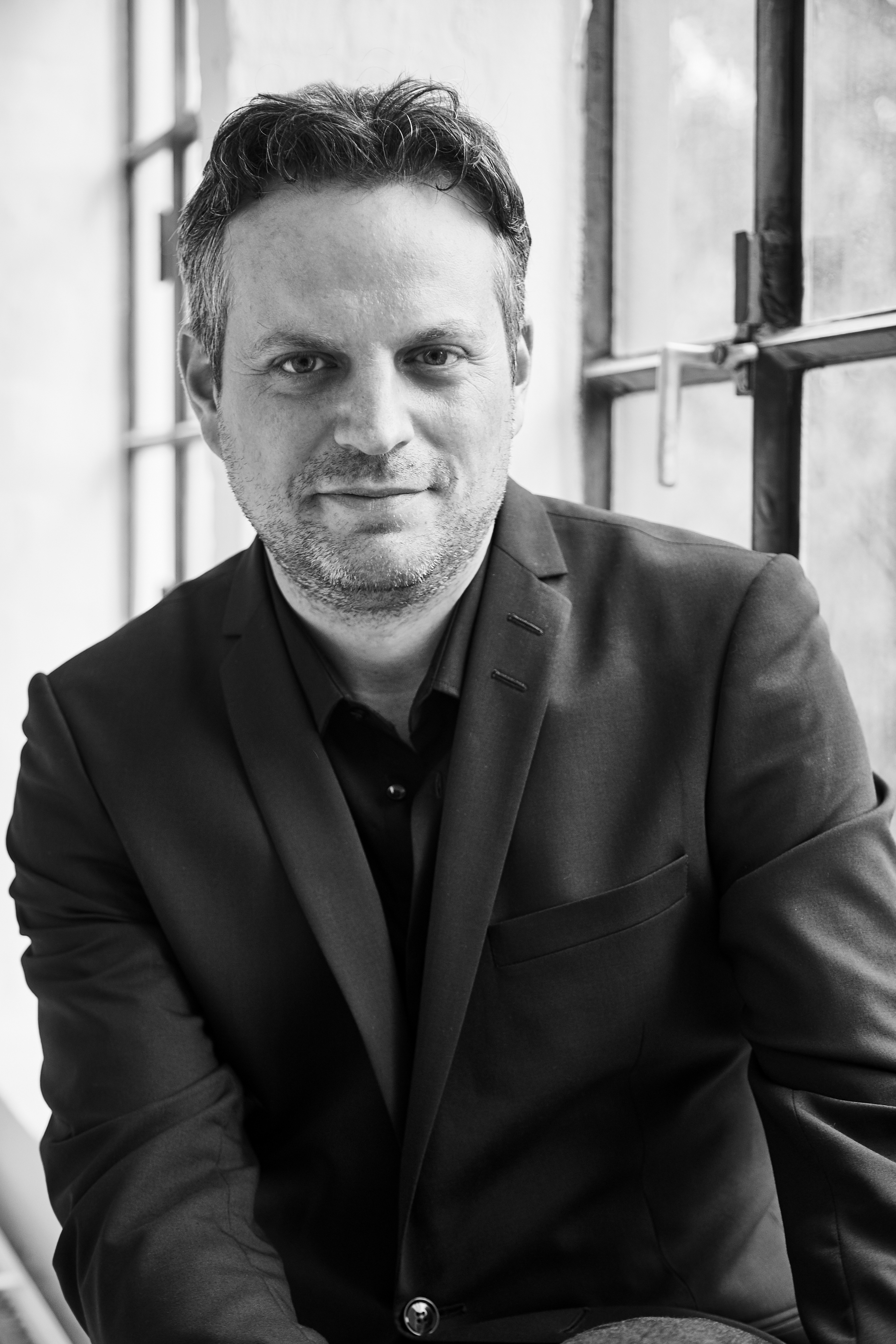 Matthias Bolliger (2017)